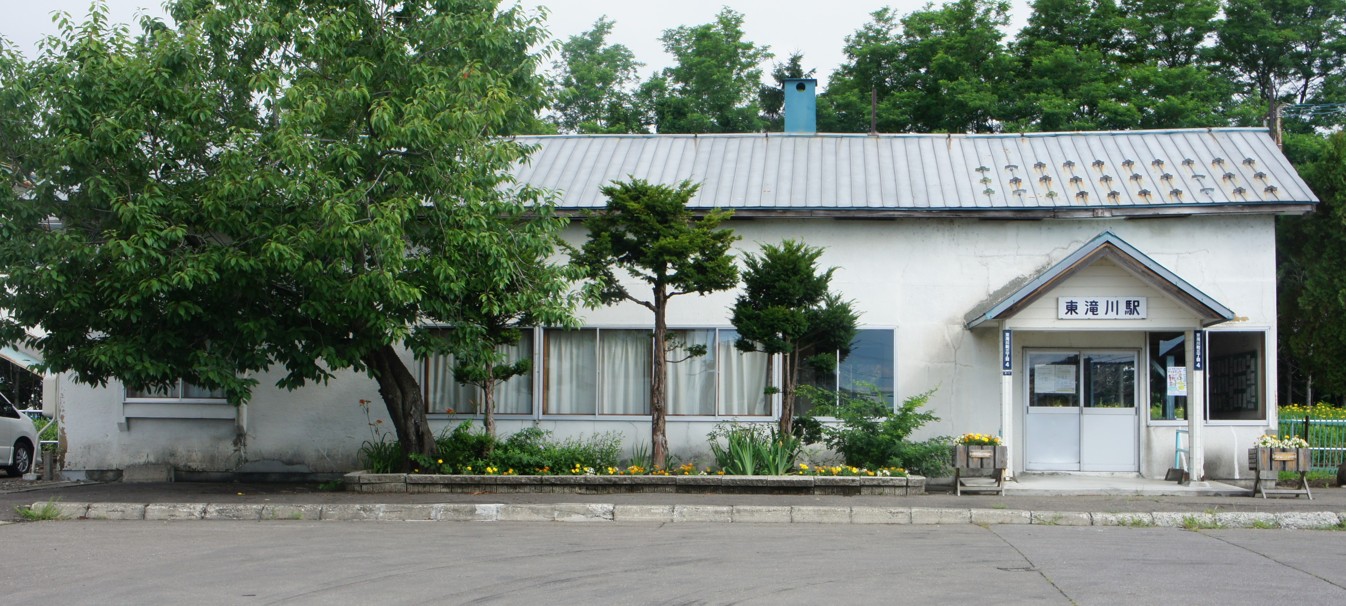 JR根室本線・東滝川駅の駅舎